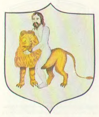 Беларуская (тарашкевіца): Герб Себежа (Siebiež)